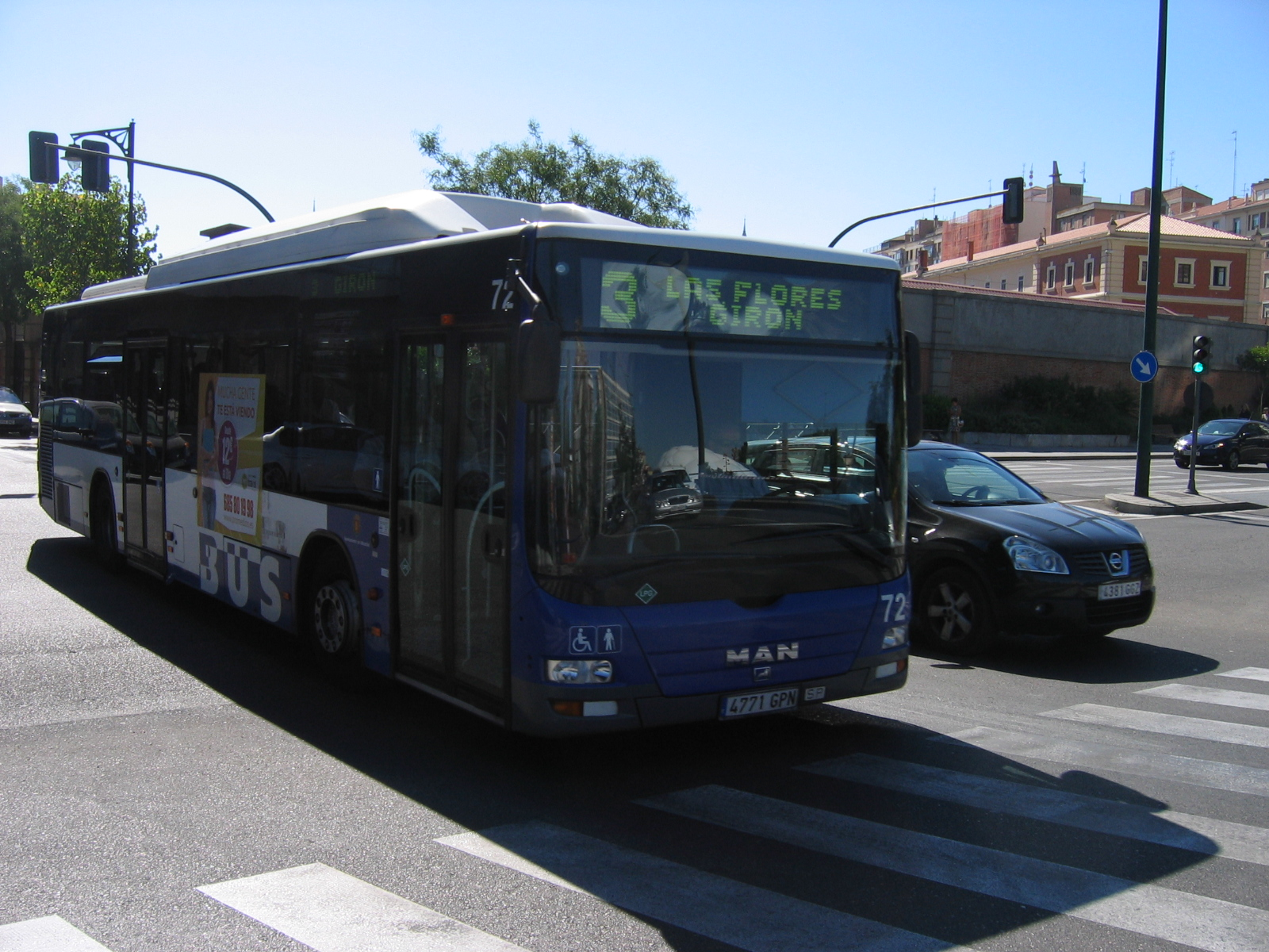 MAN NL273 Lions city